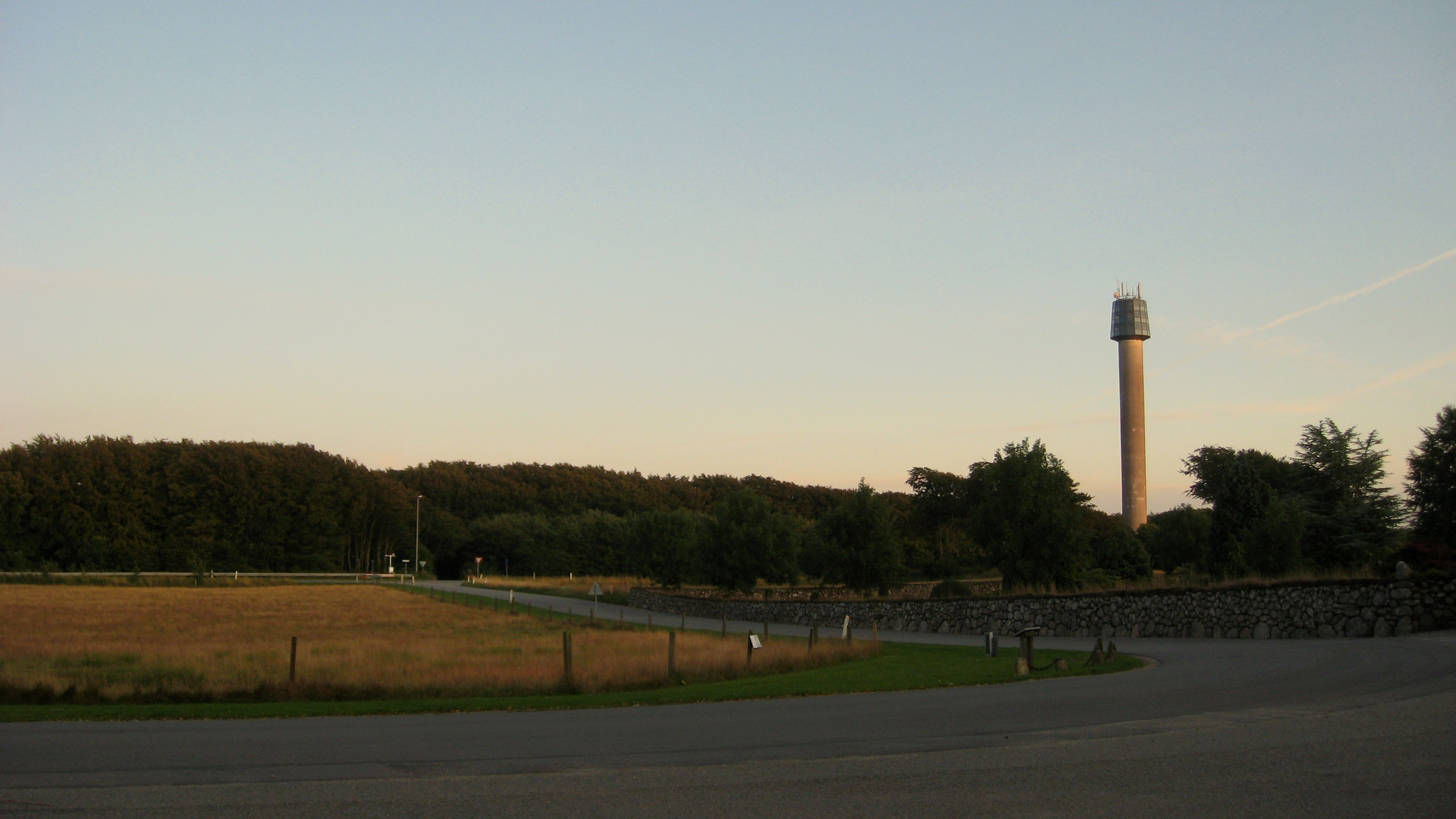 Cloostårnet ved Frederikshavn